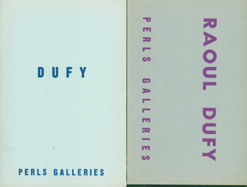 Raoul Dufy Perls Galleries 1950 1955